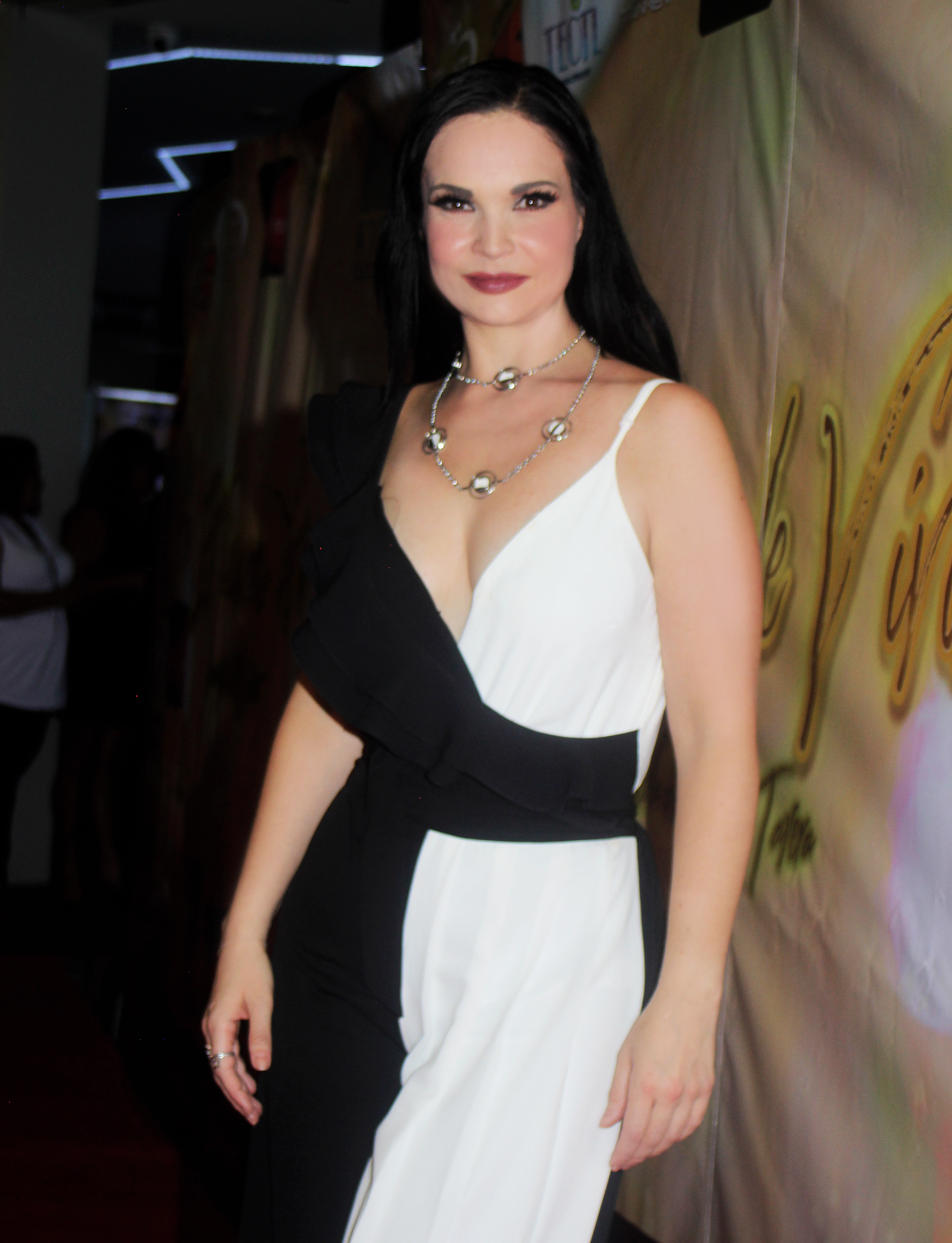 Ana Patricia Rojo Alfombra roja del film El Triunfo de Vivir